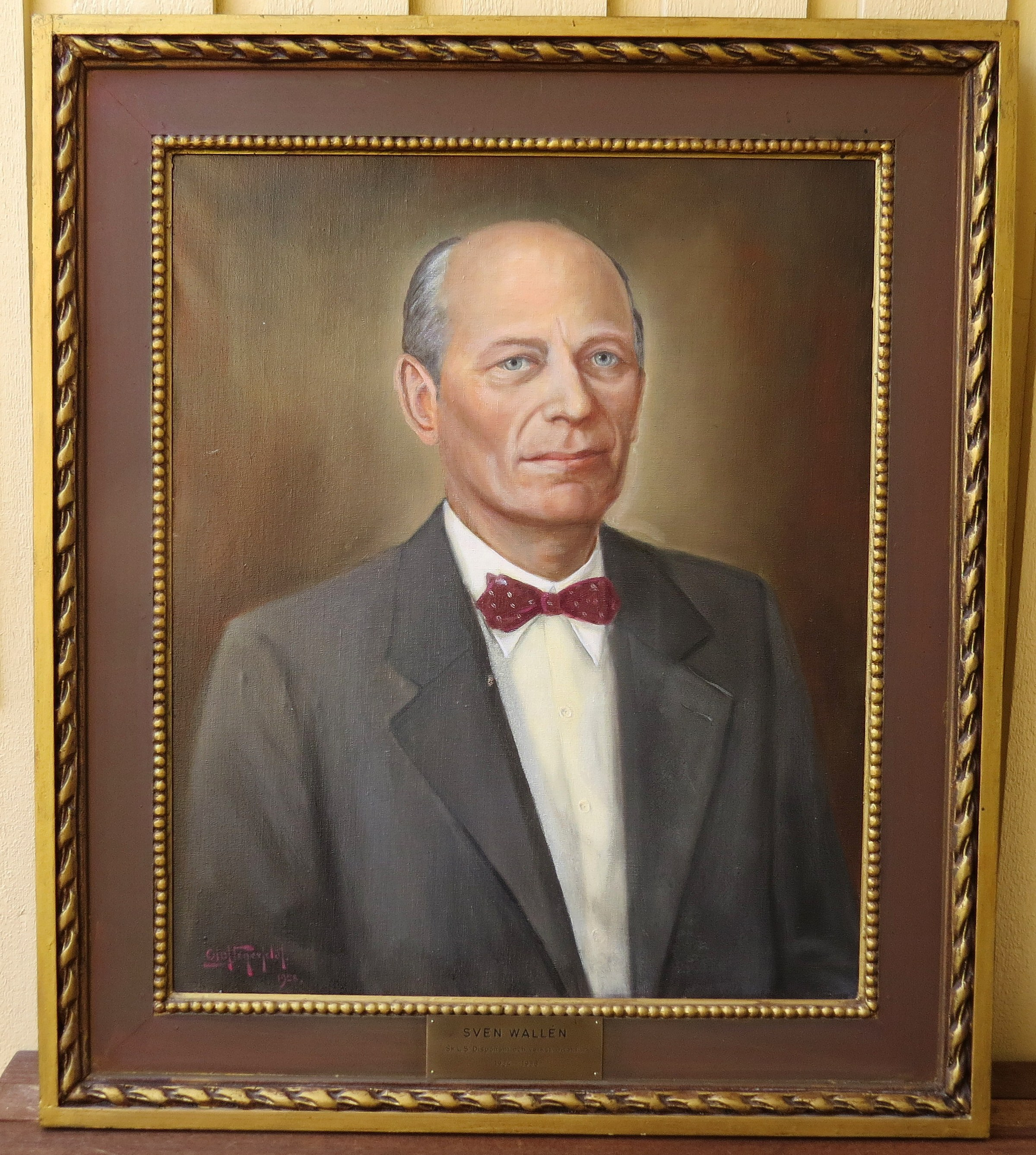 Det här porträttet gjordes på beställning av slakteriet i samband med hans pensionering därifrån och hängde under en tid där, han var VD och disponent 1934-1958. Porträttet finns nu hos dottersonen med samma namn. Konstnären hette Olof Segerfeldt.